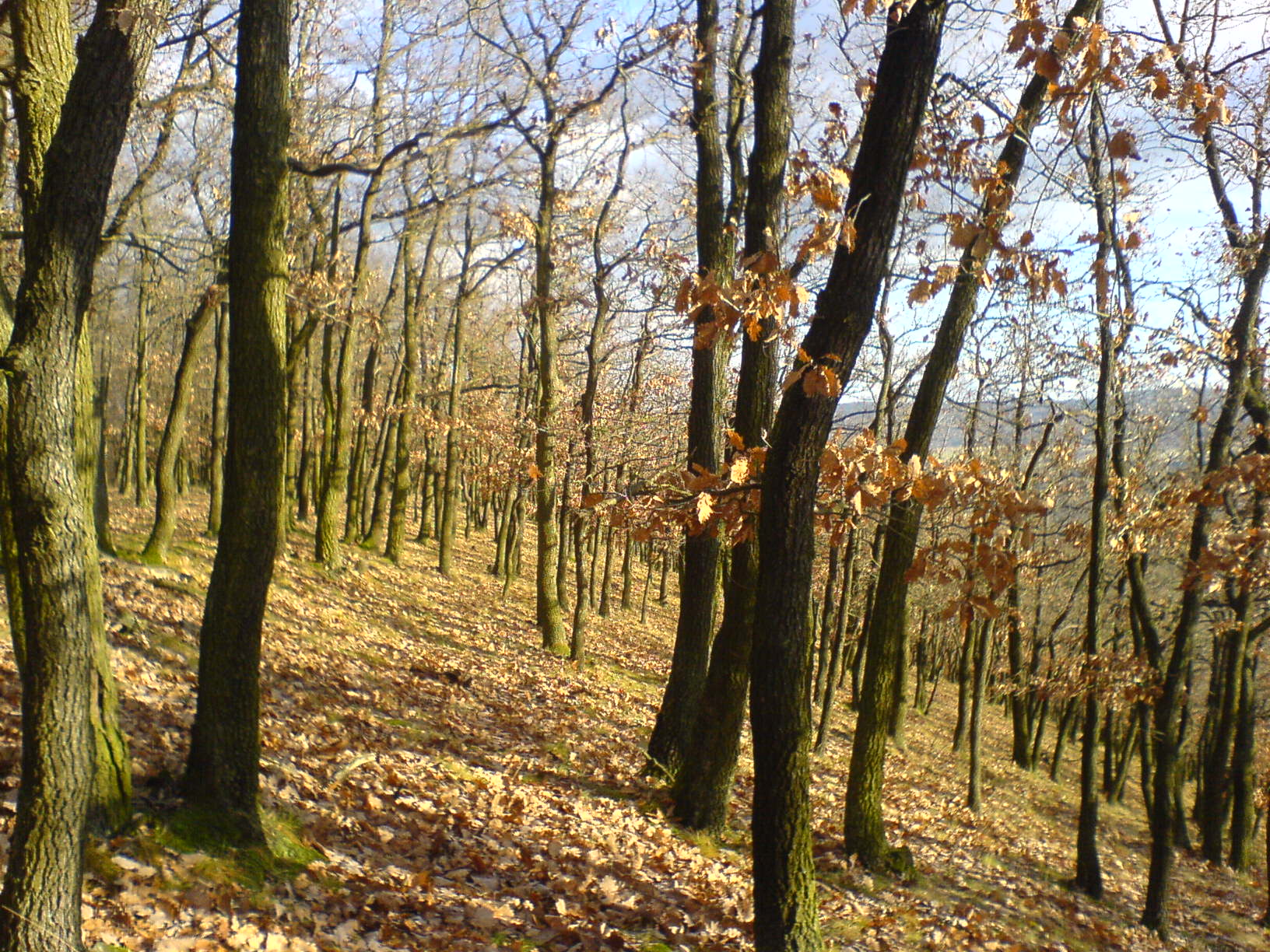 Česky: Dubový les na jižním svahu Housiny v pozdním podzimu